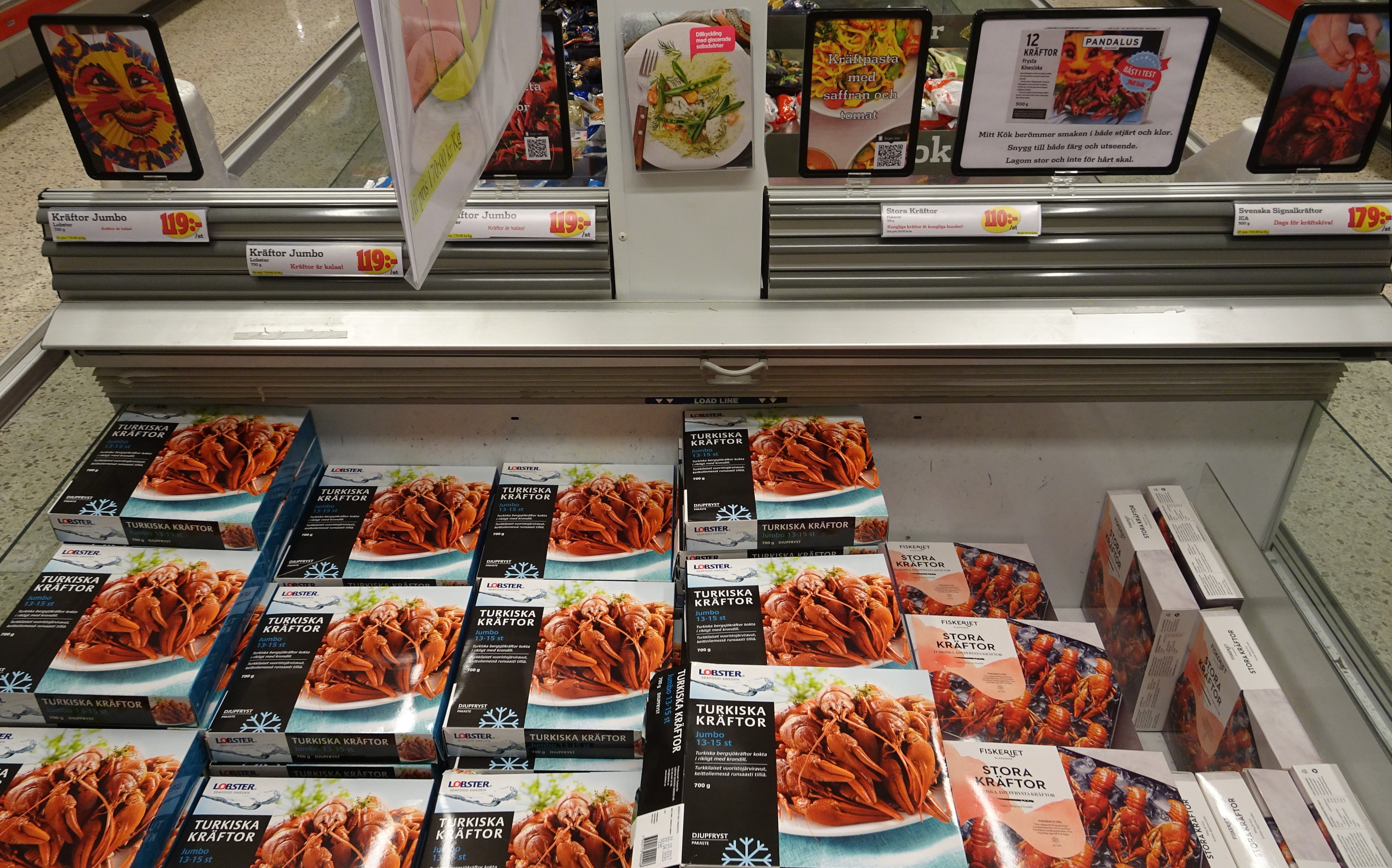 Frysta kräftor i svensk livsmedelsbutik